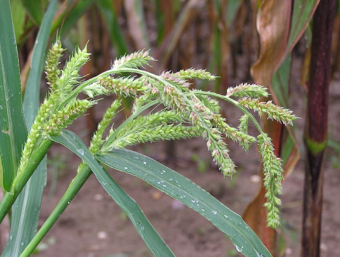 Echinochloa crus-galli am Rande eines Maisfeldes bei Neuss (in Deutschland). Zwei Blütenstände.